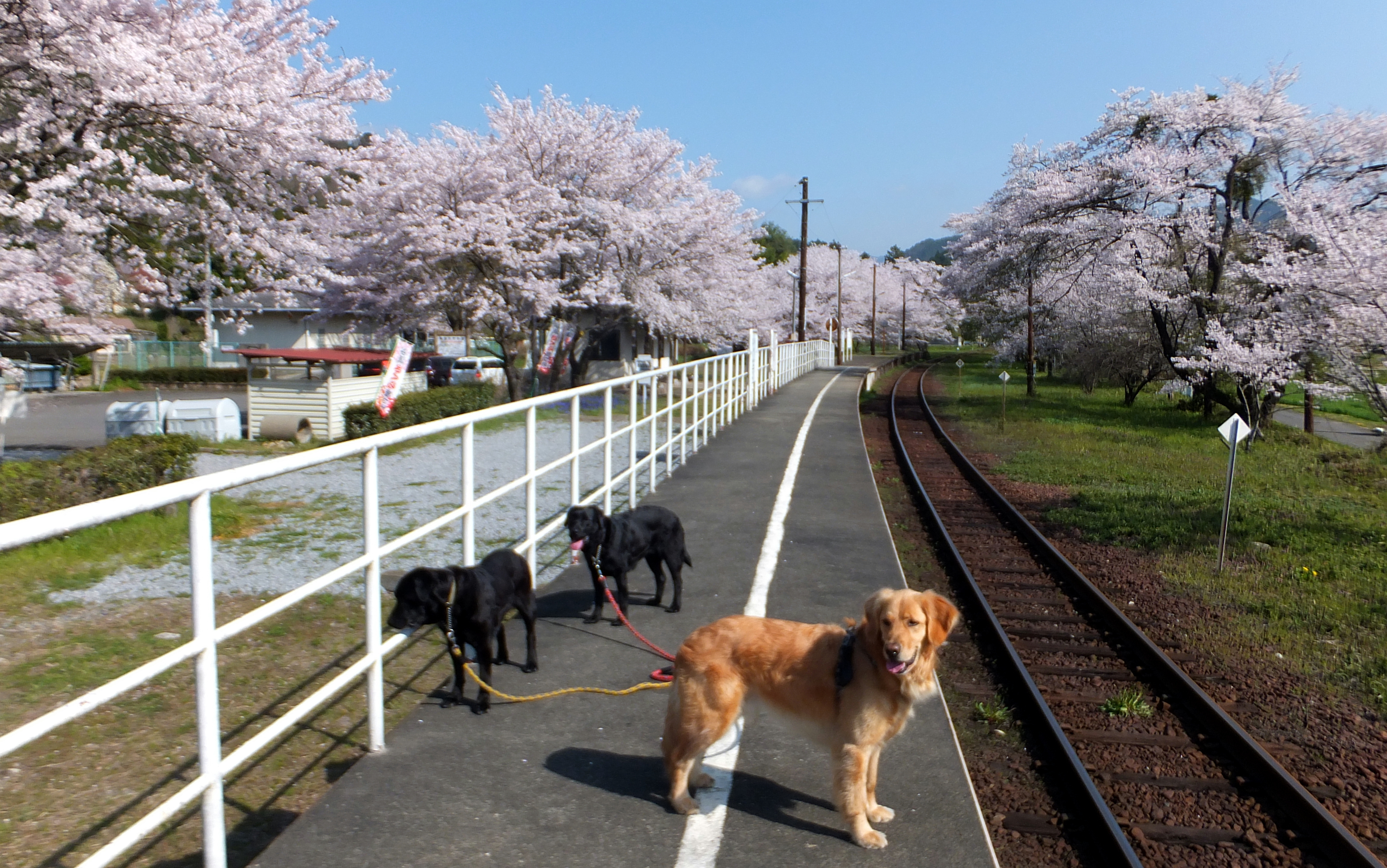 谷汲口駅の桜